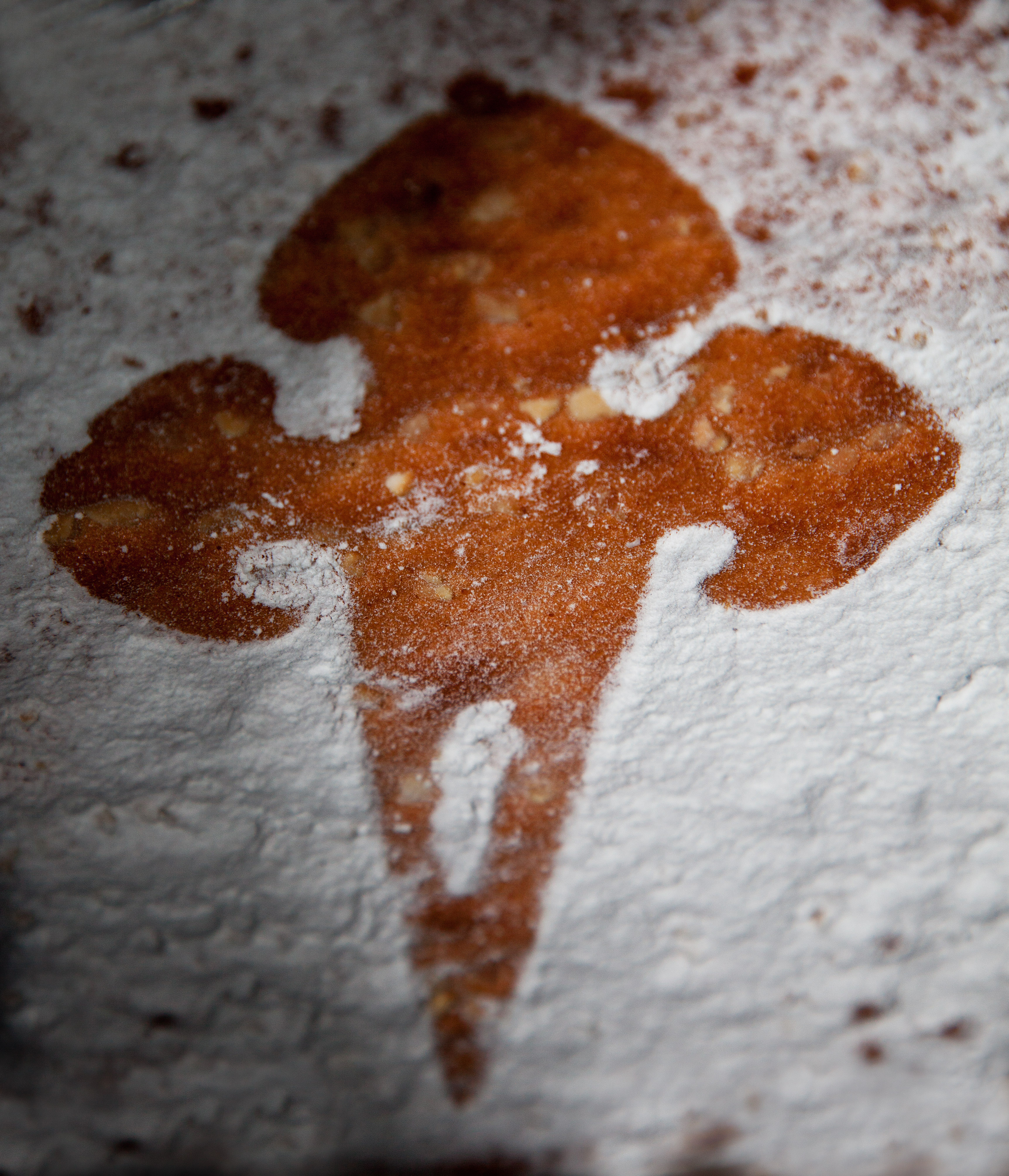 Detalle de la cruz de una Tarta de Santiago.